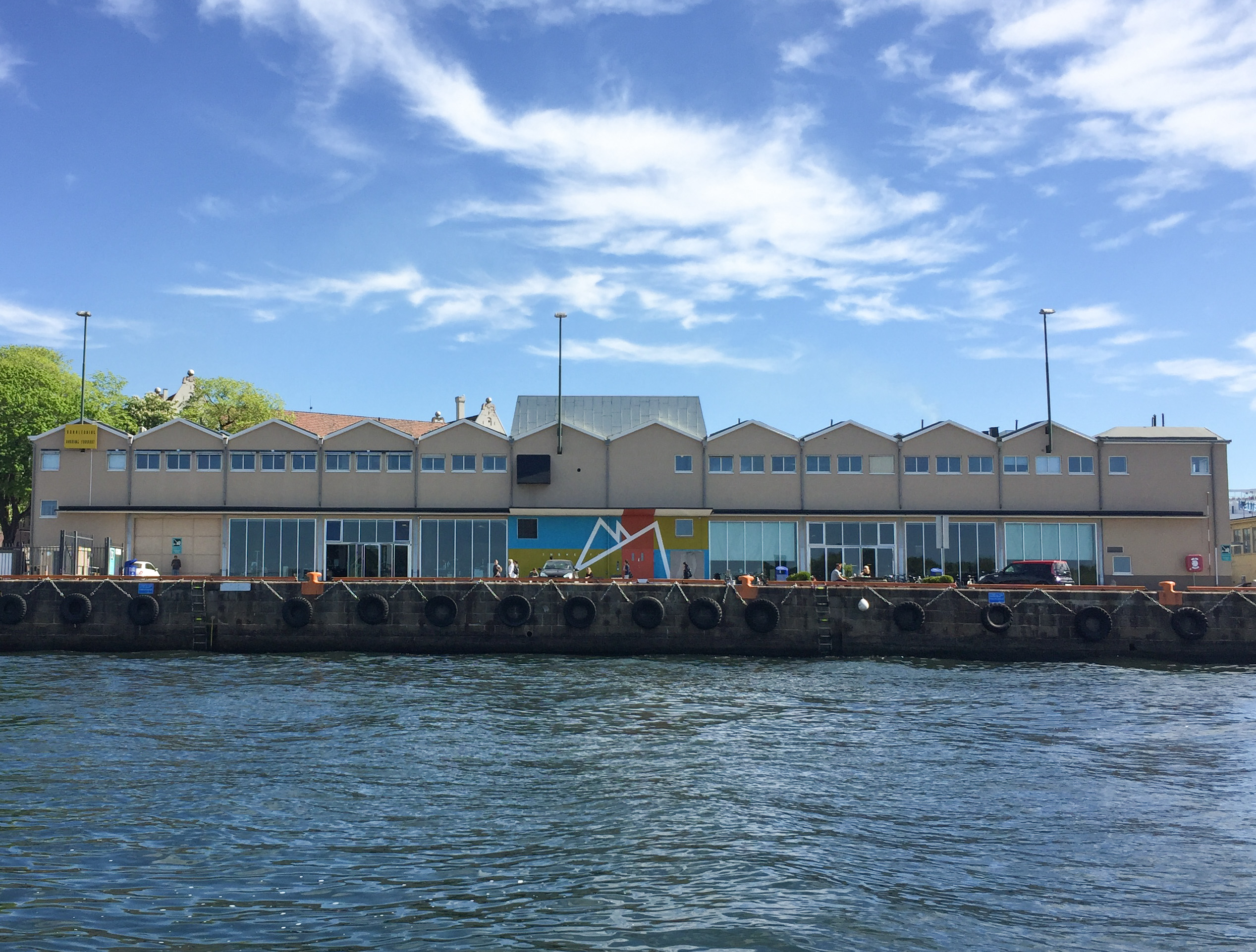 Skur 39 på Vippetangen i Oslo havn 26. mai 2017